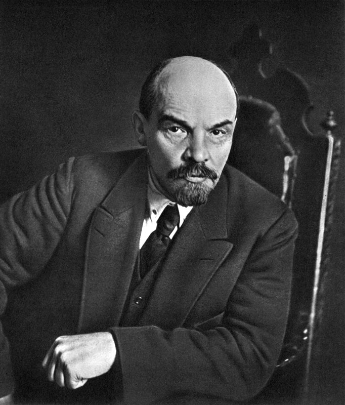 Lenin, retrato publicado en 1921.